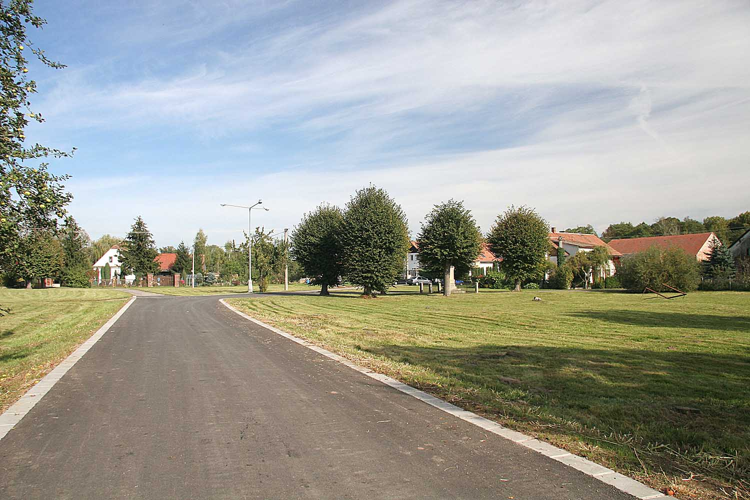 Náves obce Hrobice u Pardubic, district Pardubice, Czech Republic autor:Prazak date: 9. 10. 2006